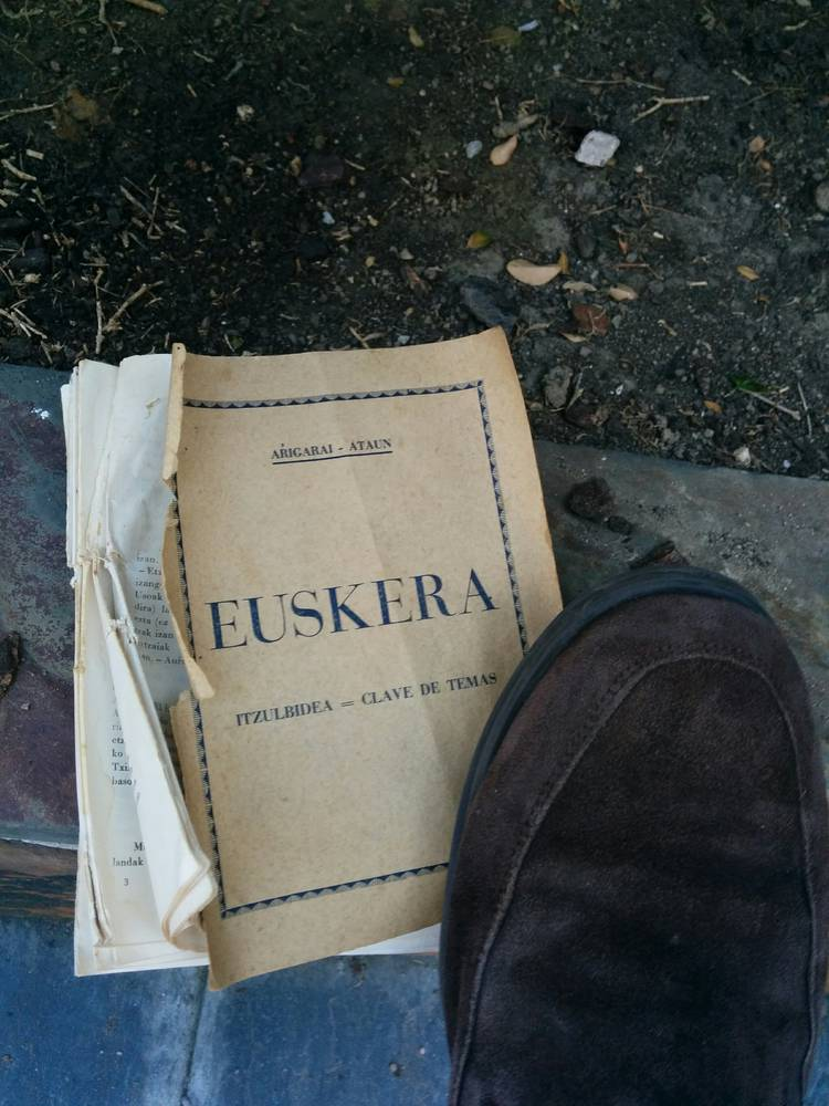 Gramática del euskera / Itzulbidea = Clave de temas, Aŕigarai-Ataun, Donostia, 1932. Ataun = Imanol Apalategi (Bonifacio de Ataun); Arrigarai = Celestino Peralta (Bernardo de Aŕigarai). Kalean botata aurkitua, EHUri emana.